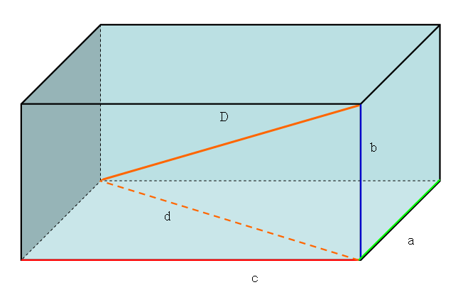 Este es el teorema de pitágoras en el espacio, la diagonal de un ortoedro al cuadrado es igual a la suma de la longitudes de tres de sus aristas (cada una elevada al cuadrado).